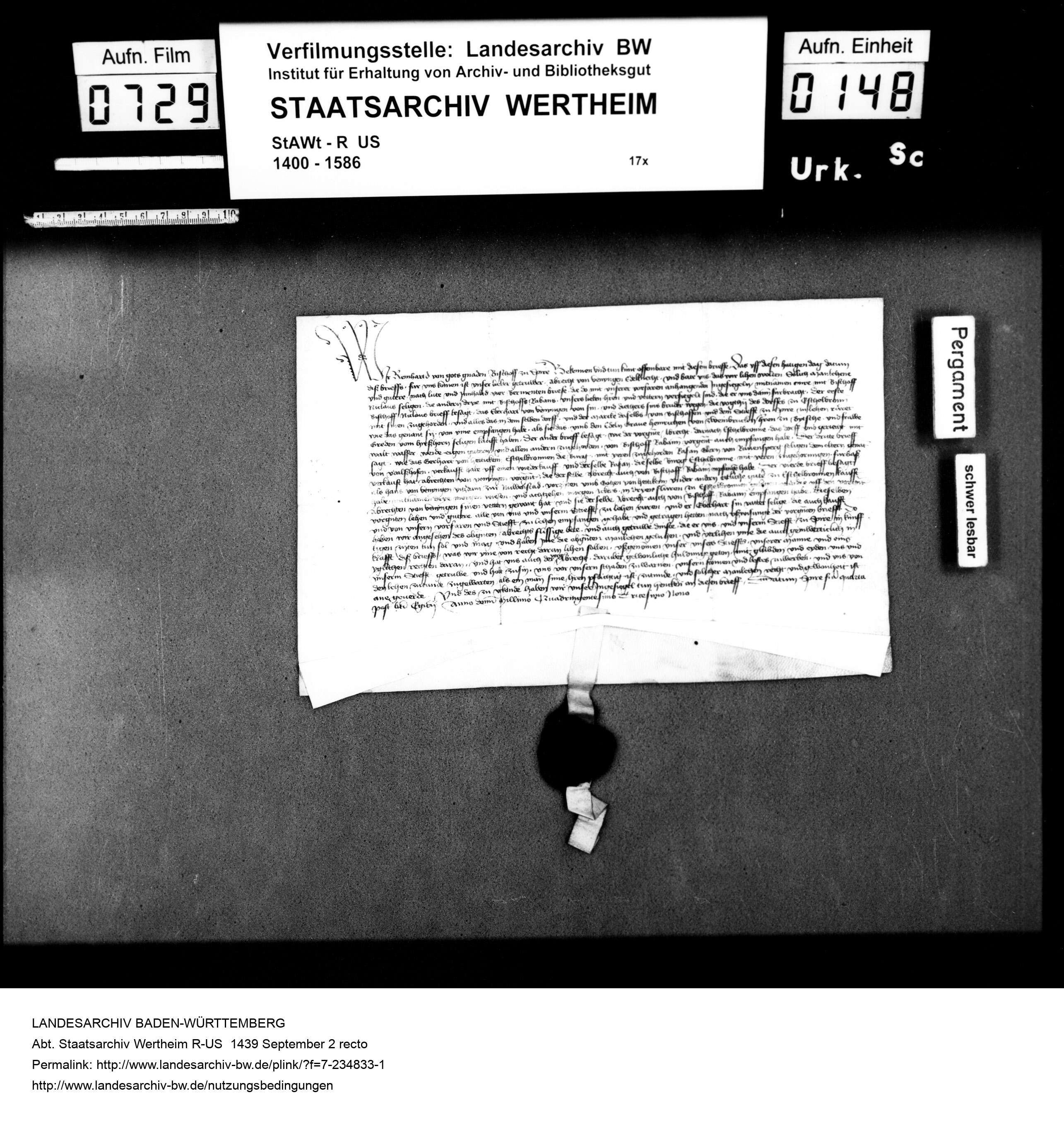 Reinhard, Bischof zu Speyer (Spire), belehnt Abrecht von Venyngen mit den Stifts Gütern zu Eschelbronn.